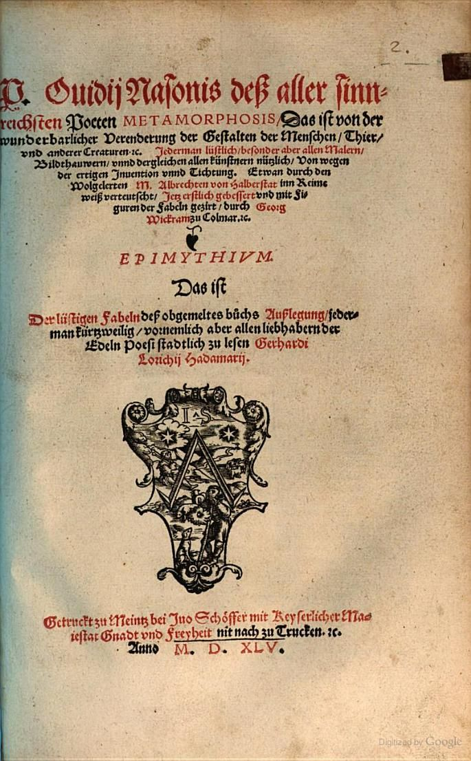 Albrecht von Halberstadt. "Metamorphosen" des Ovid